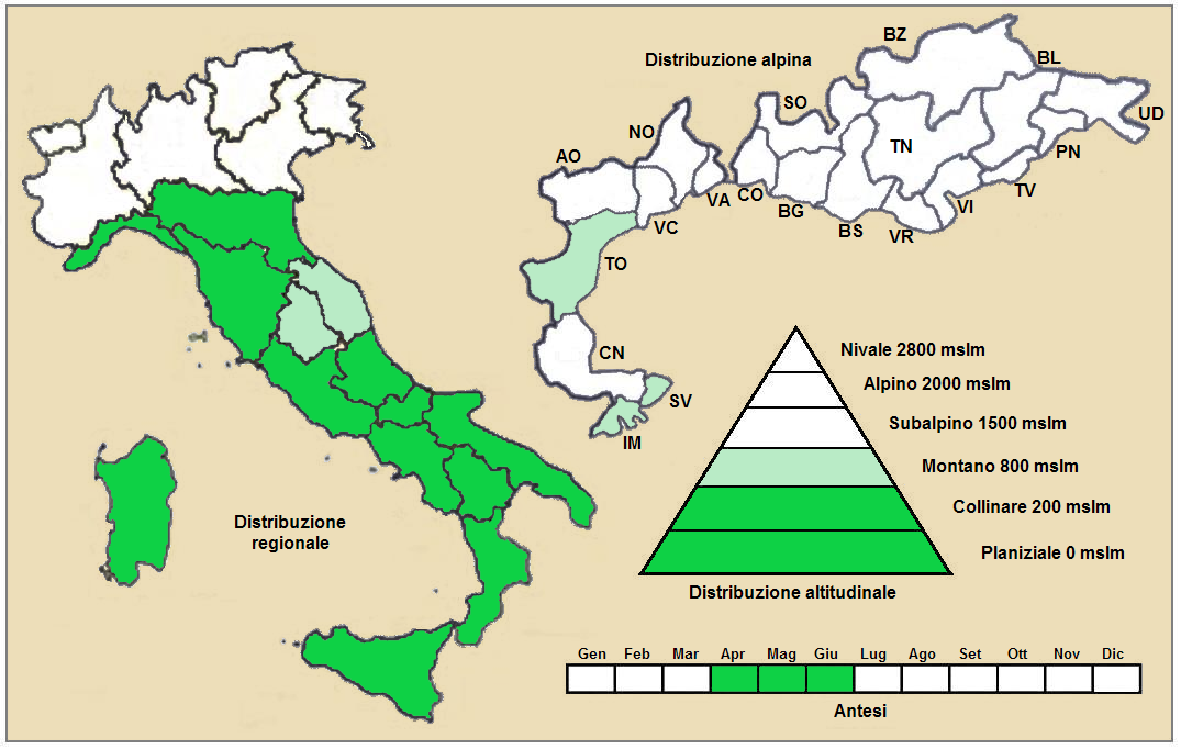 Forasacco purpureo (Bromus rubens - Distribuzione italiana)